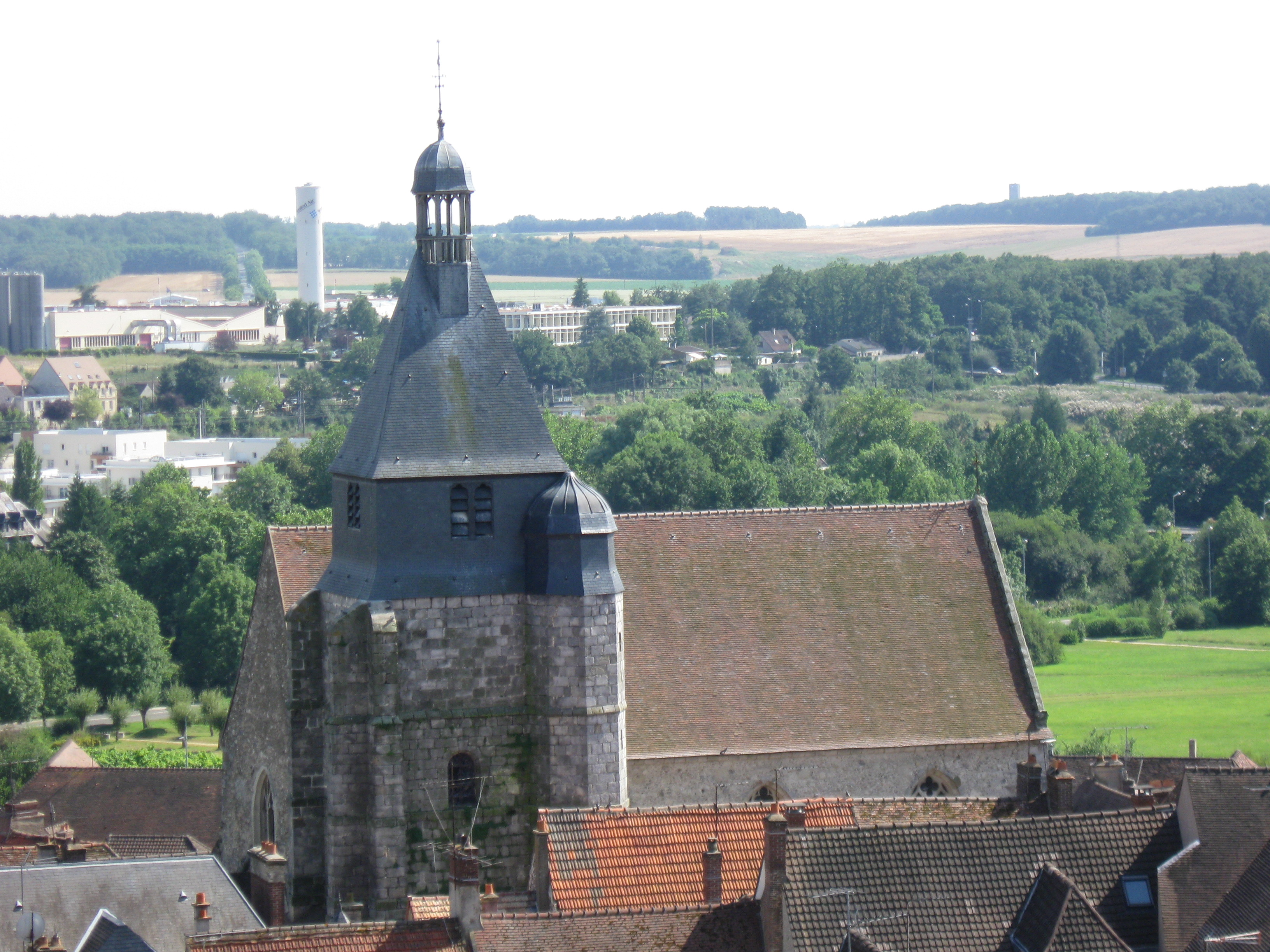 église Saint-Pierre d'Épernon. Elle est mentionnée dans des actes du (XIIe siècle). L'ensemble du monument date du (XVe siècle). (Épernon, département d'Eure-et-Loir, région Centre-Val de Loire).